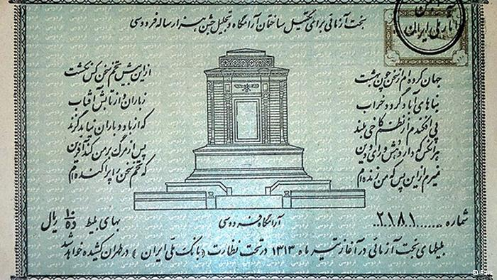 بلیت بخت‌آزمایی برای تكمیل ساختمان آرامگاه و تجلیل جشن هزار ساله فردوسی، اولین بلیط بخت آزمایی ایران که متعلق به ۸۰ سال پیش است. روی این بلیت، تصویری از آرامگاه فردوسی و شعری از این شاعر چاپ شده است.